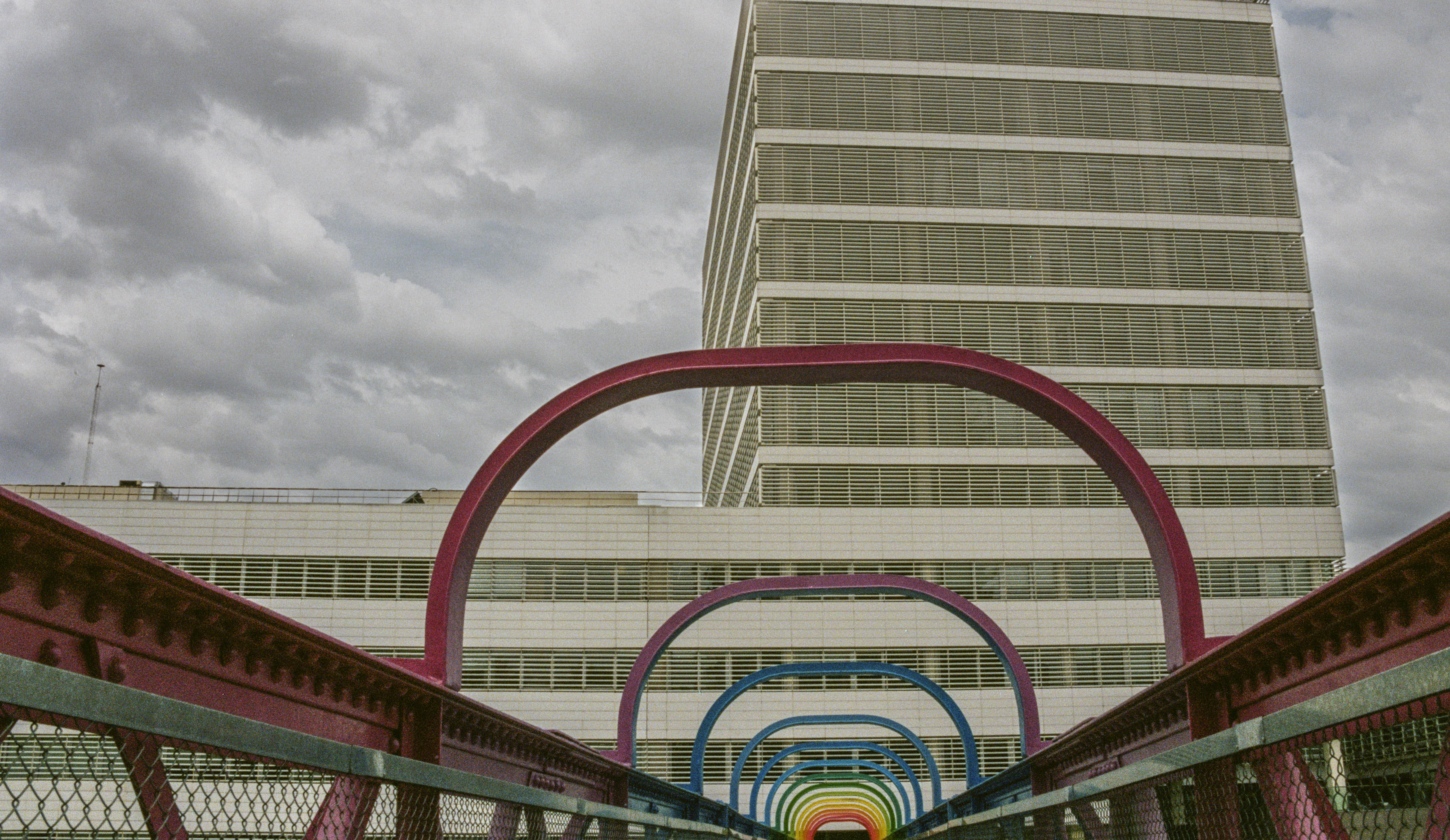 Sitio: Polo científico tecnológico